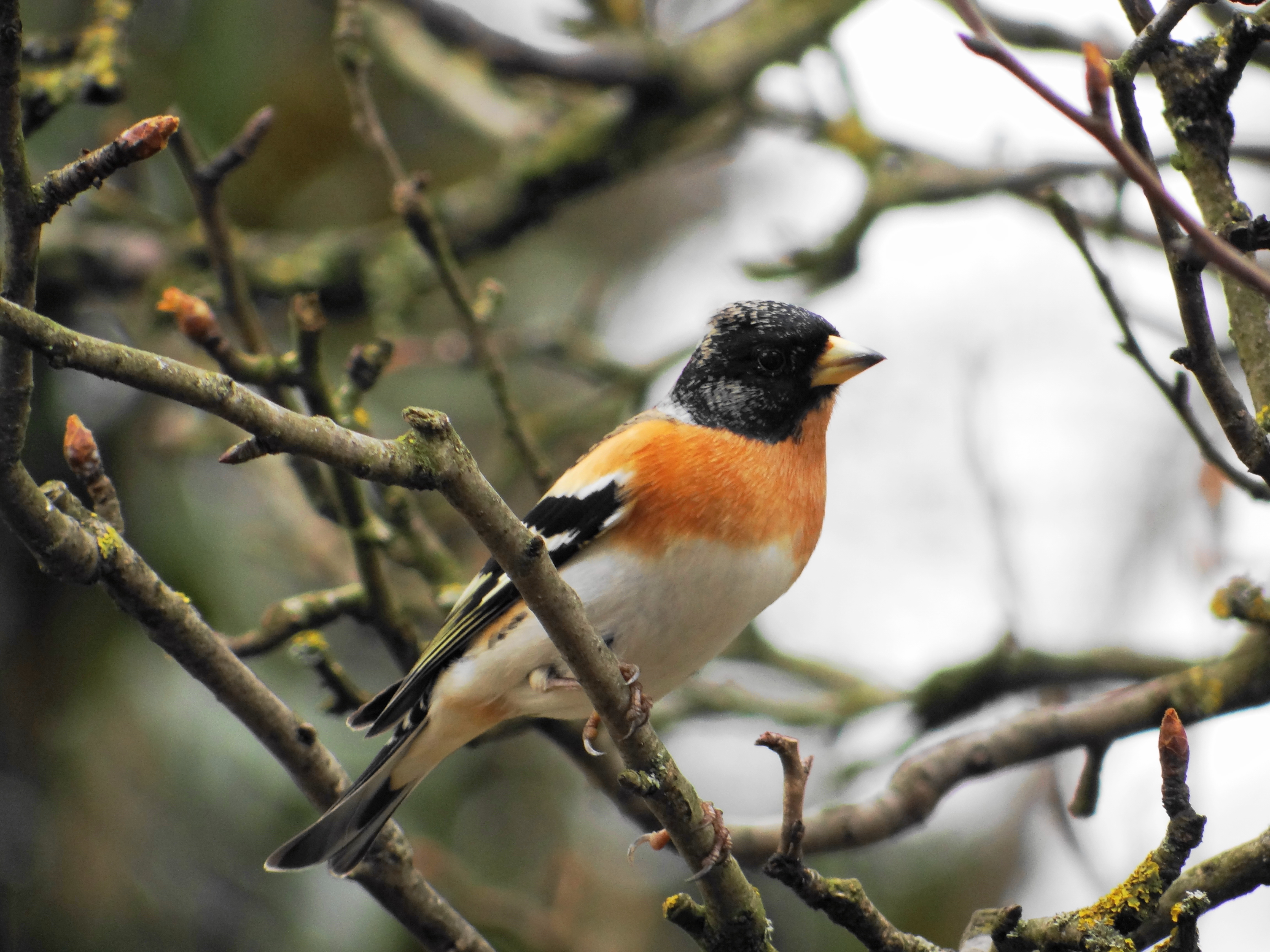 pinson du nord mâle mars 2013